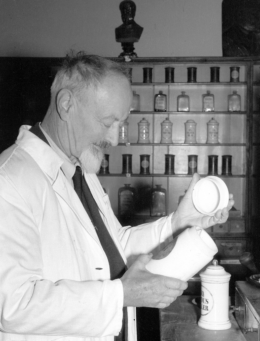 Dr. Fran Minarik.